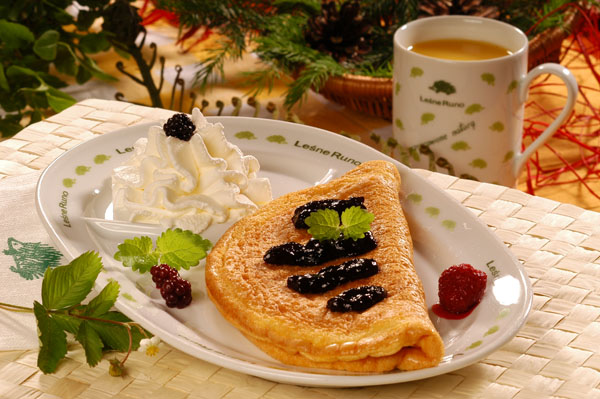 Omlet na słodko, jeden ze specjałów restauracji "Leśne Runo"